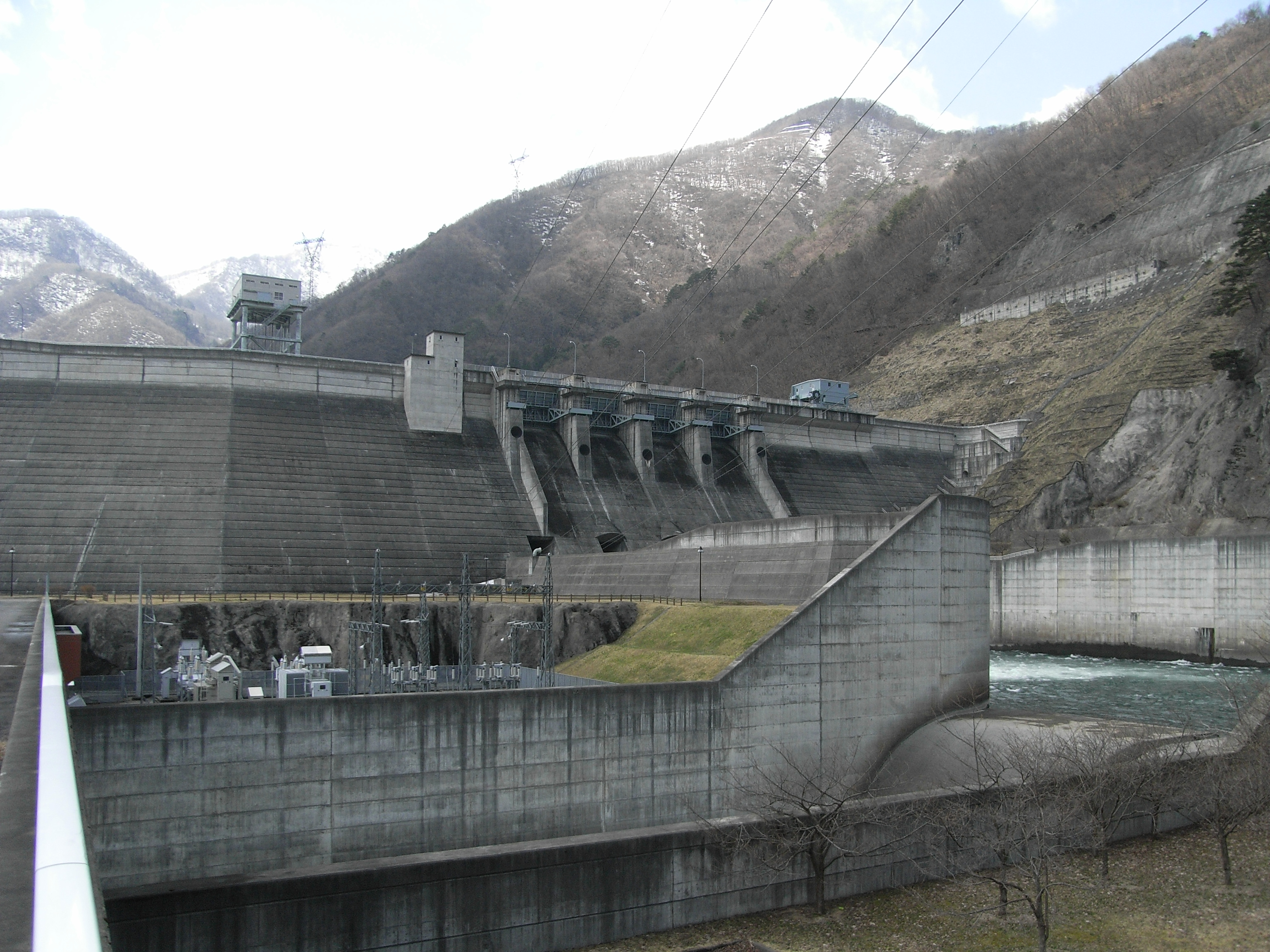 Dam